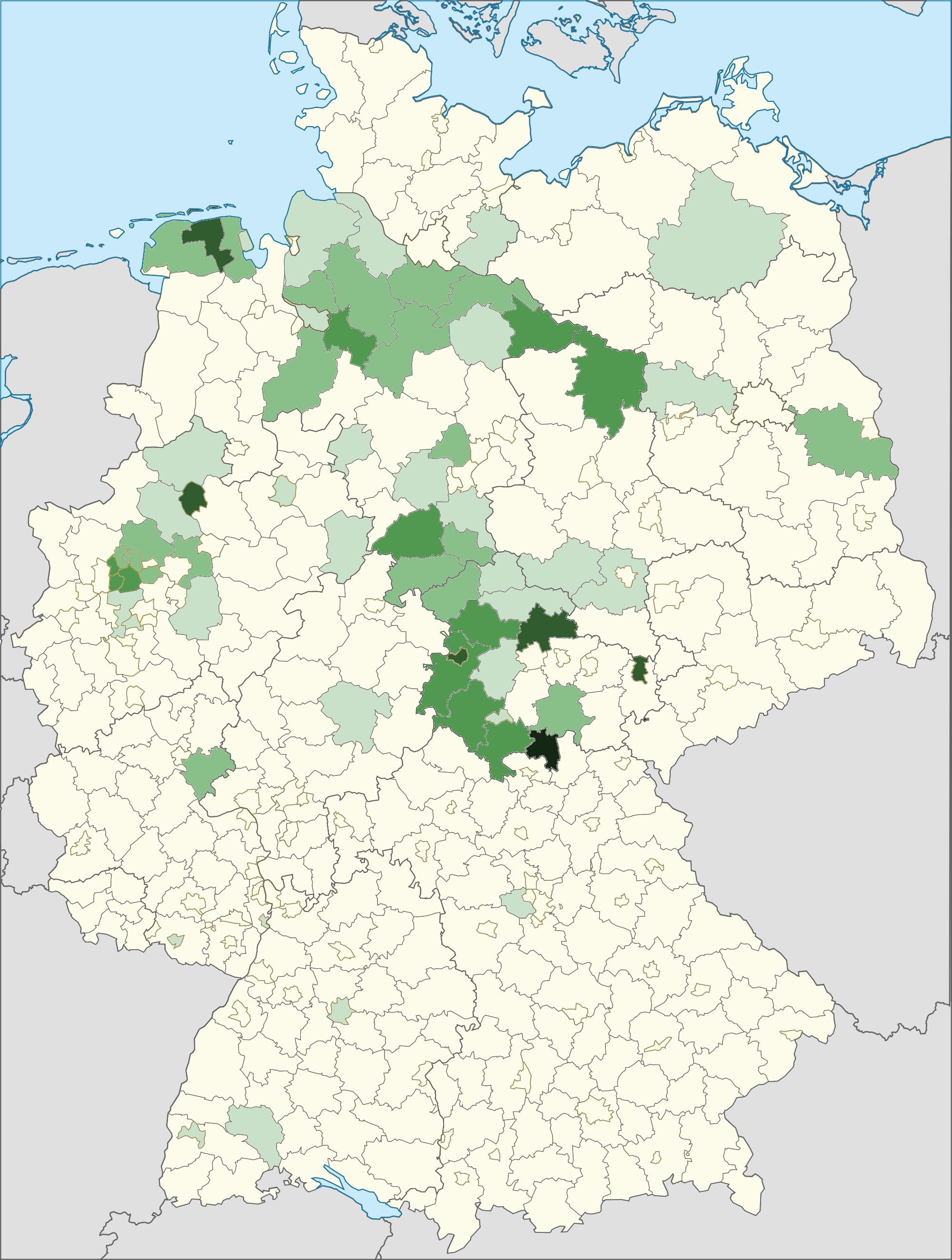 Karte der Personen mit serbischer Staatsangehörigkeit und deren relativer Häufigkeit in den Landkreisen 2014. Dunkelgrün: häufigste ausländische Staatsangehörigkeit in diesem Kreis, hellgrün: fünfthäufigste ausländische Staatsangehörigkeit in diesem Kreis, weiß: sechsthäufig oder weniger. Quelle: Ausländerzentralregister, Stand 31. Dezember 2014. Saarland: keine Daten auf Kreisebene (dargestellt ist die Landesebene). Deutschlandweite relative Häufigkeit der ausländischen Staatsangehörigkeit Serbien: Platz 8.